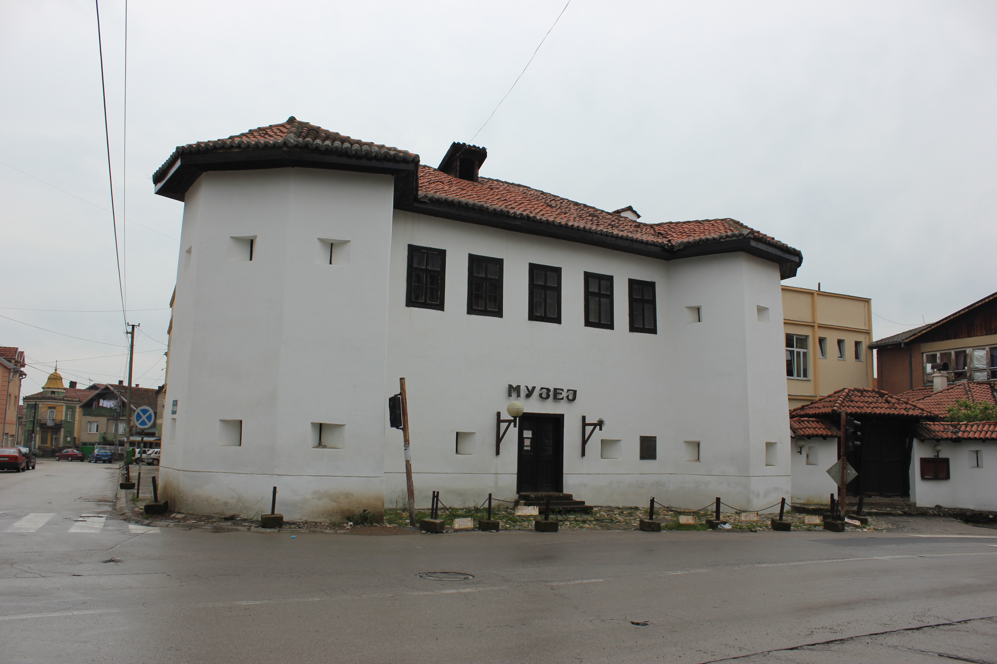 Сградата на градския музей във Власотинце, Сърбия.